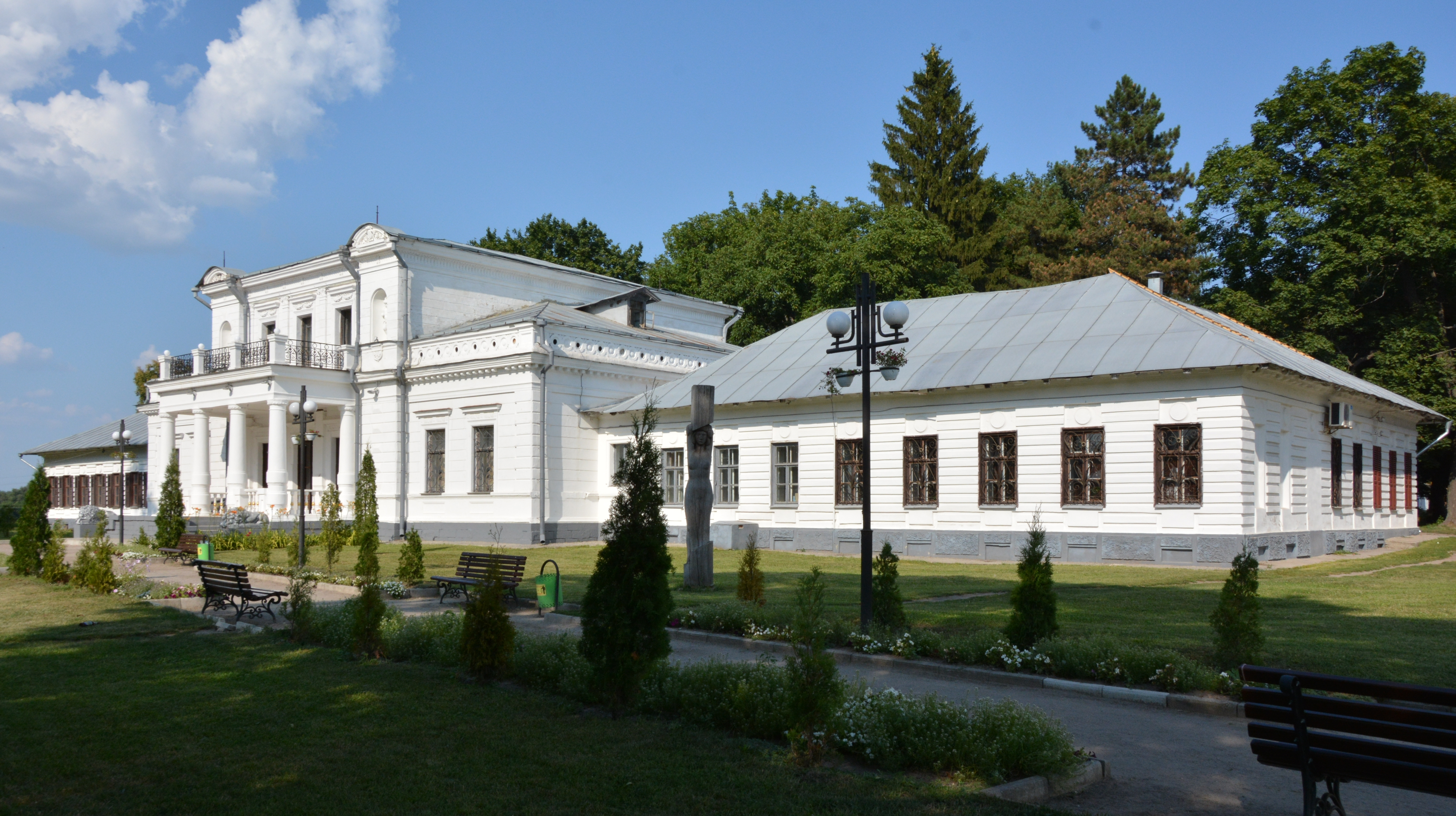 Головний будинок (мур.), Тростянець, вул. Миру, 10